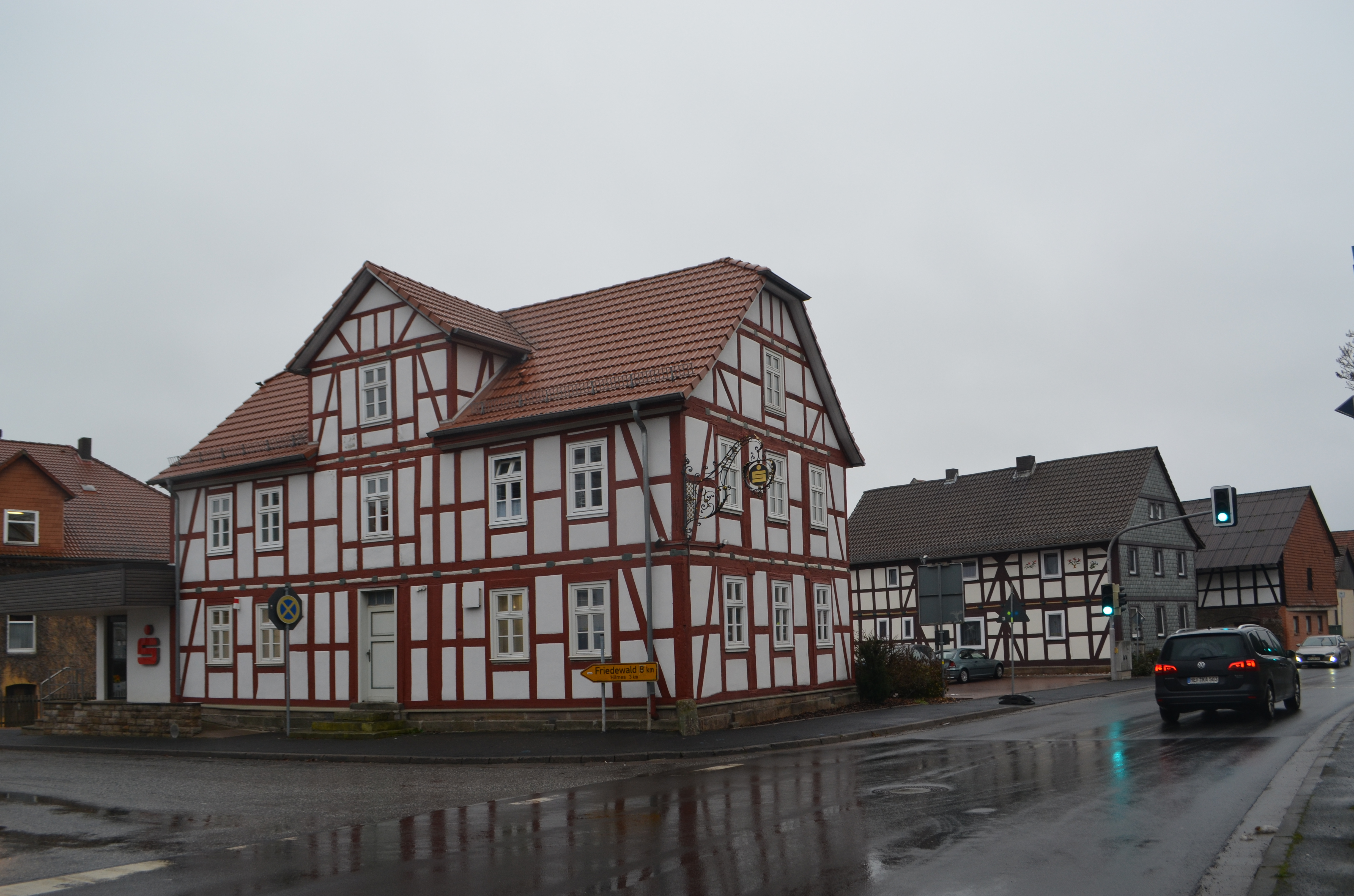 Schenklengsfeld, Landecker Straße 2